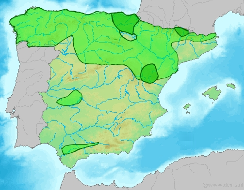 Zonas militarmente carlistas y zonas de apoyo popular